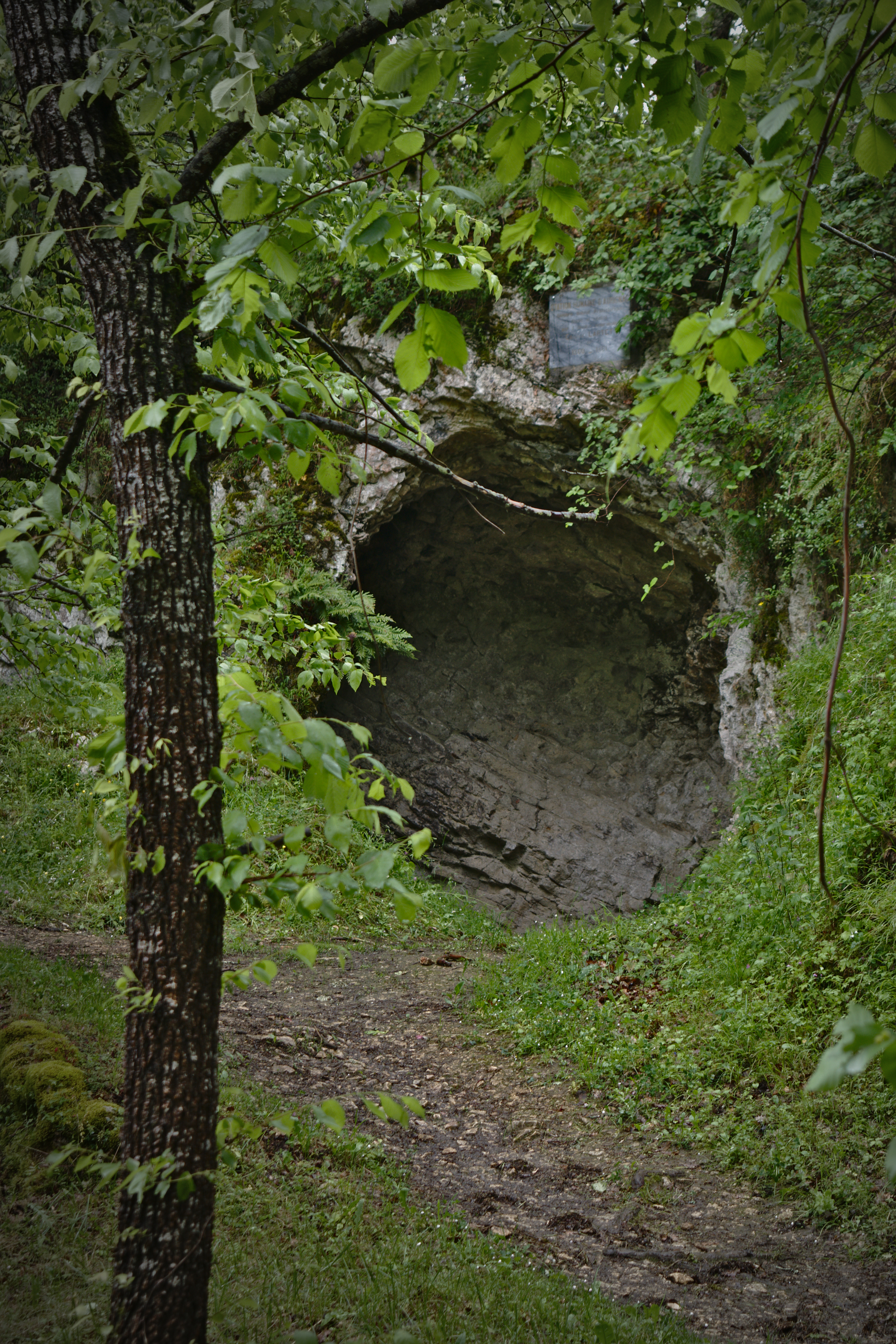 Abri préhistorique (grotte d'Aurignac) .